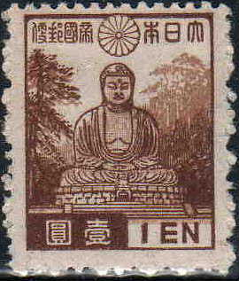 鎌倉大仏を描く1円切手